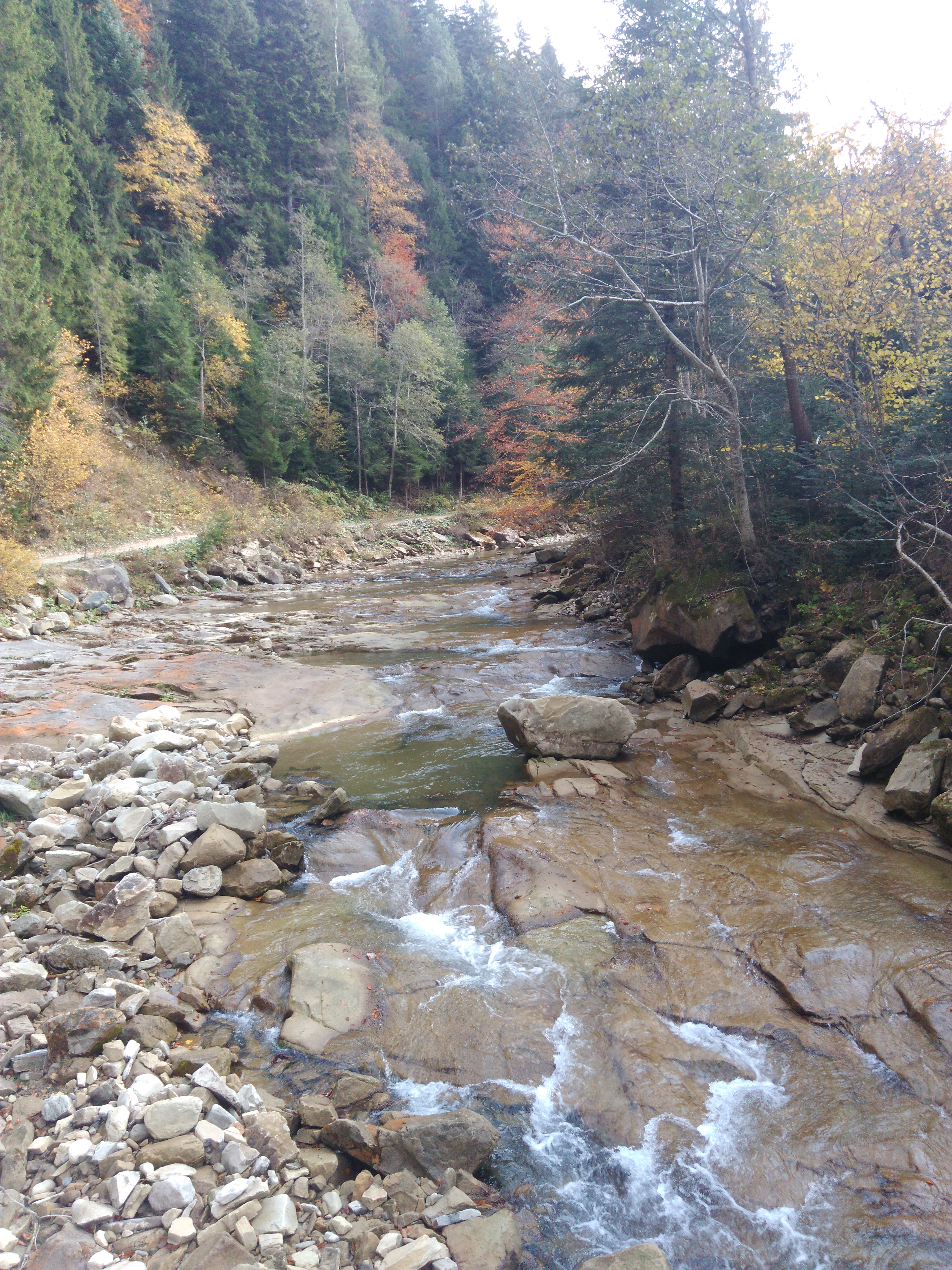 Прутець Чемегівський в середній течії в селі Микуличин.